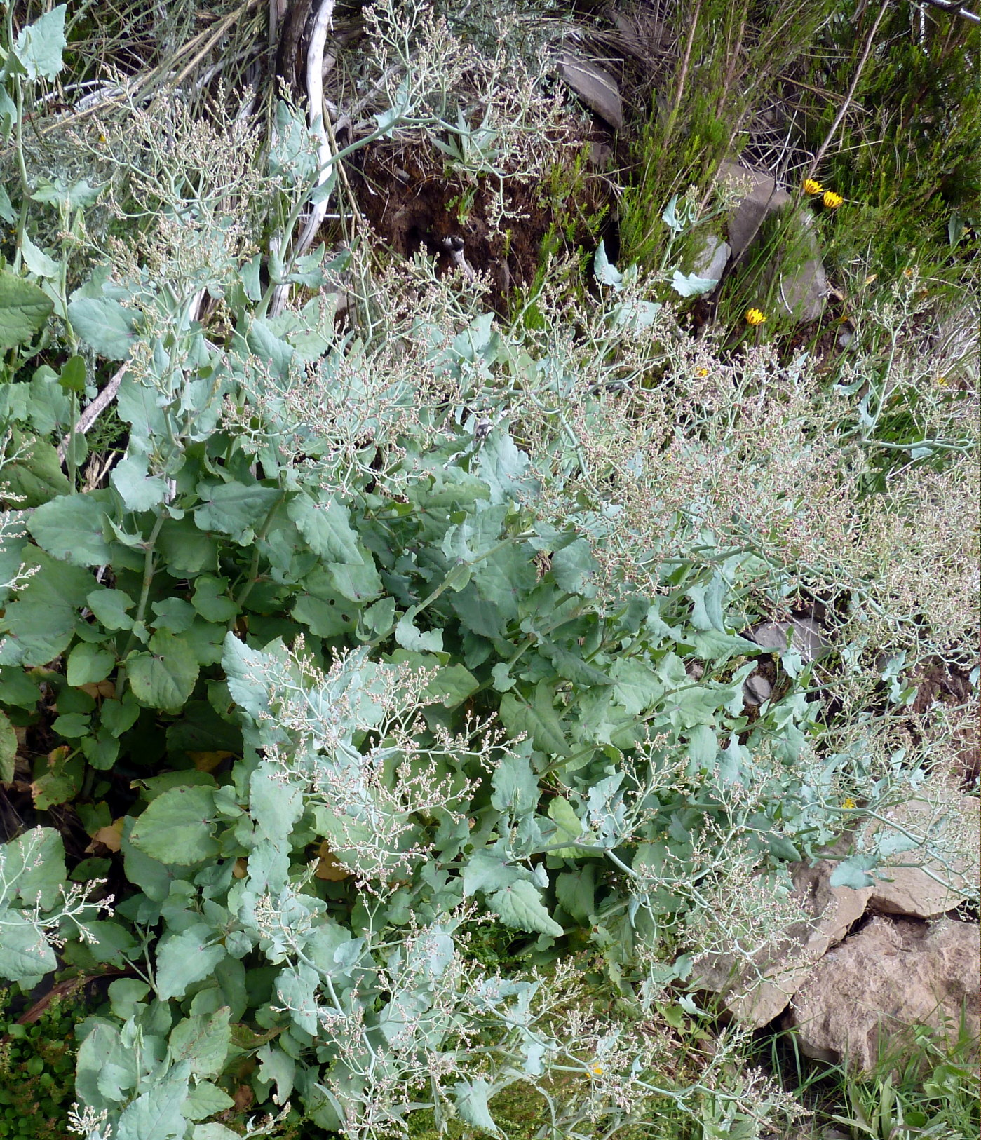 Rumex maderensis, Ile de Madère